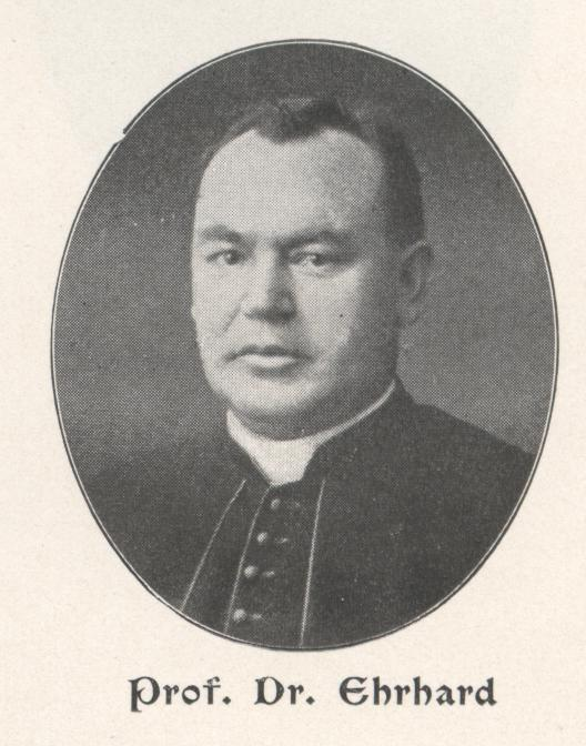 Dr. Albert Ehrhardt, Priester, Professor für Kirchengeschichte